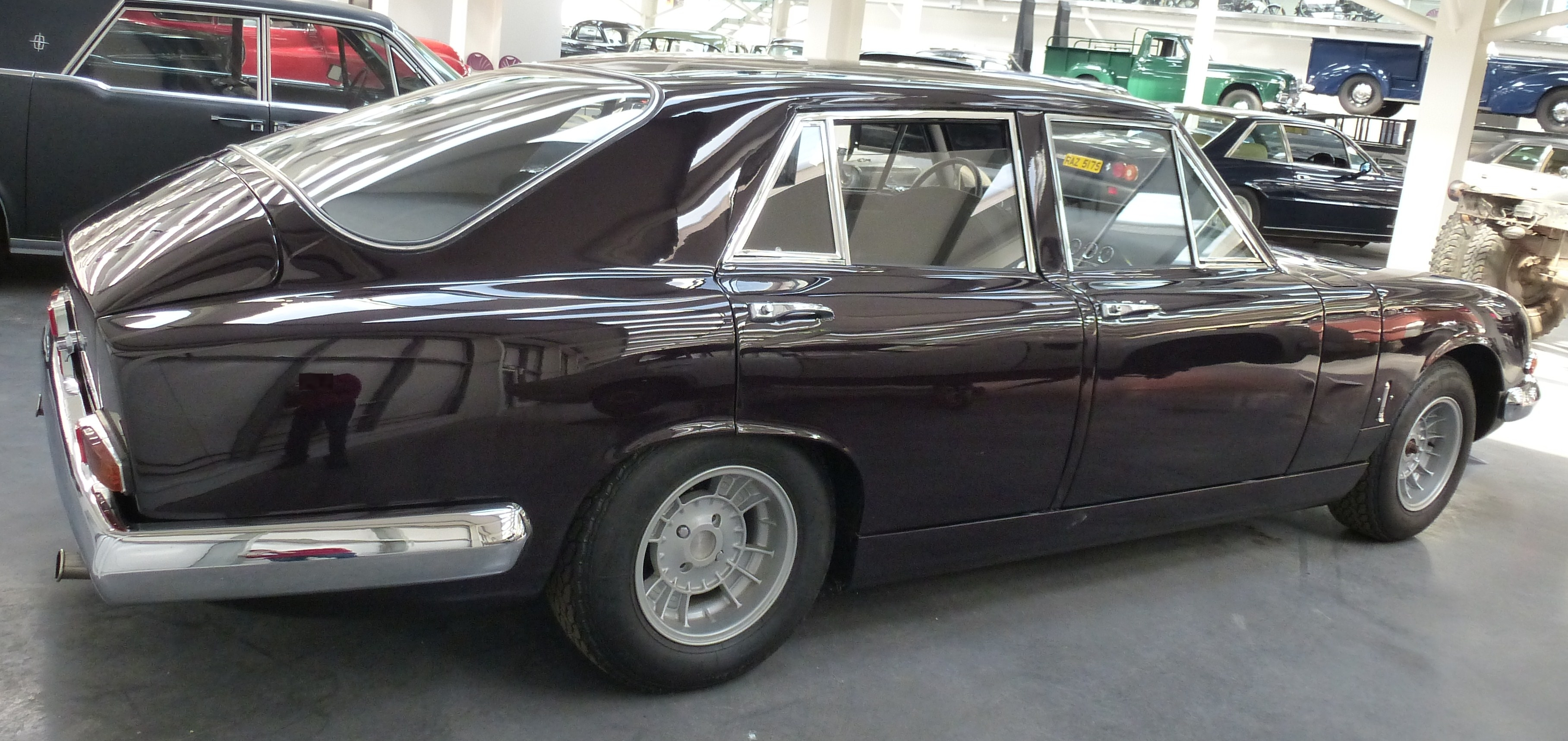 Monica Prototyp 1 von 1968